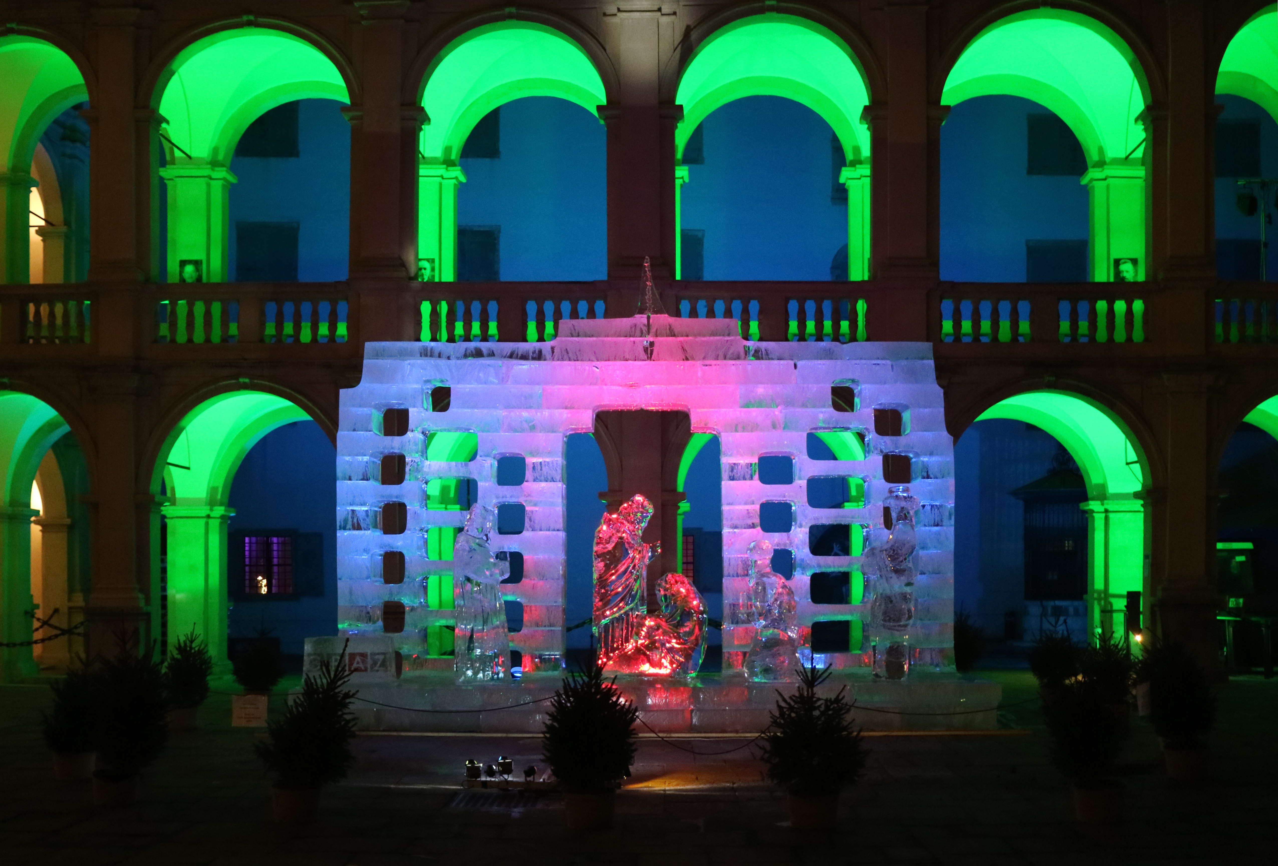 Eiskrippe im Grazer Landhaushof 2017